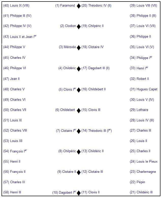 Une des dispositions possibles des statues des rois de France dans la Grand-Salle du palais de la Cité selon Uwe Bennert